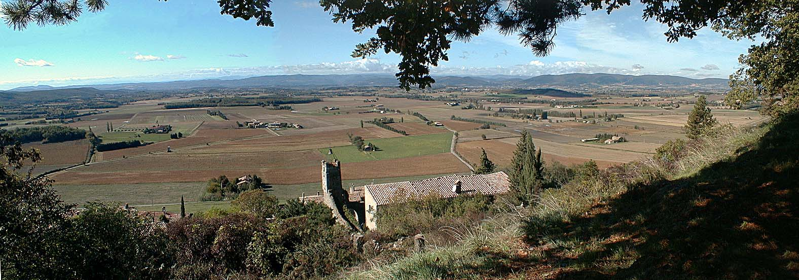 Panorama sur la plaine de Châteauneuf de Mazenc en montant vers la chapelle du Mt Carmel.